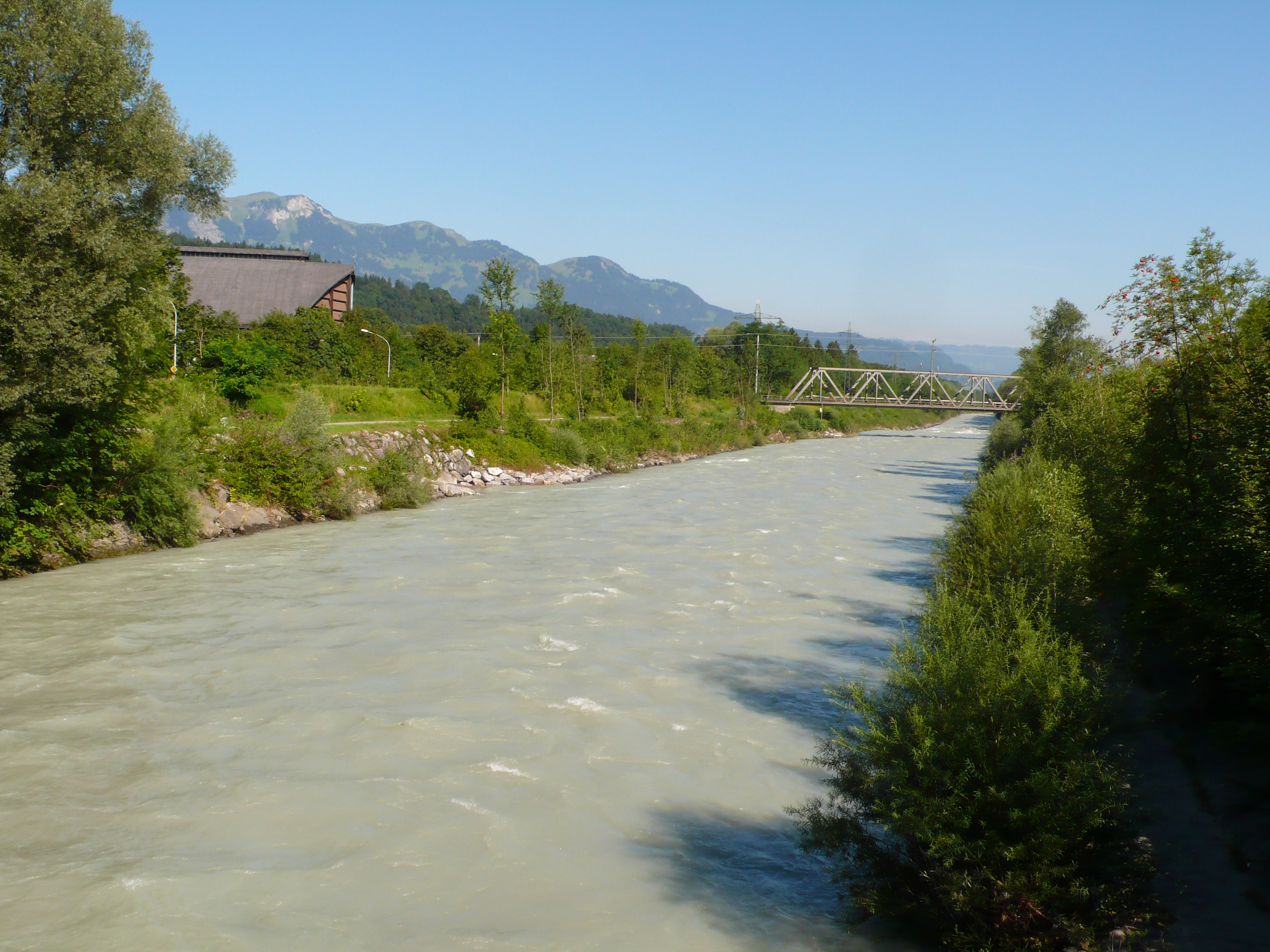 Ill bei Feldkirch-Gisingen